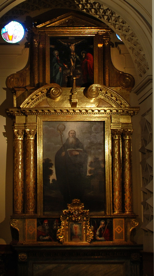 retablo de la capilla Sandoval, Pamplona